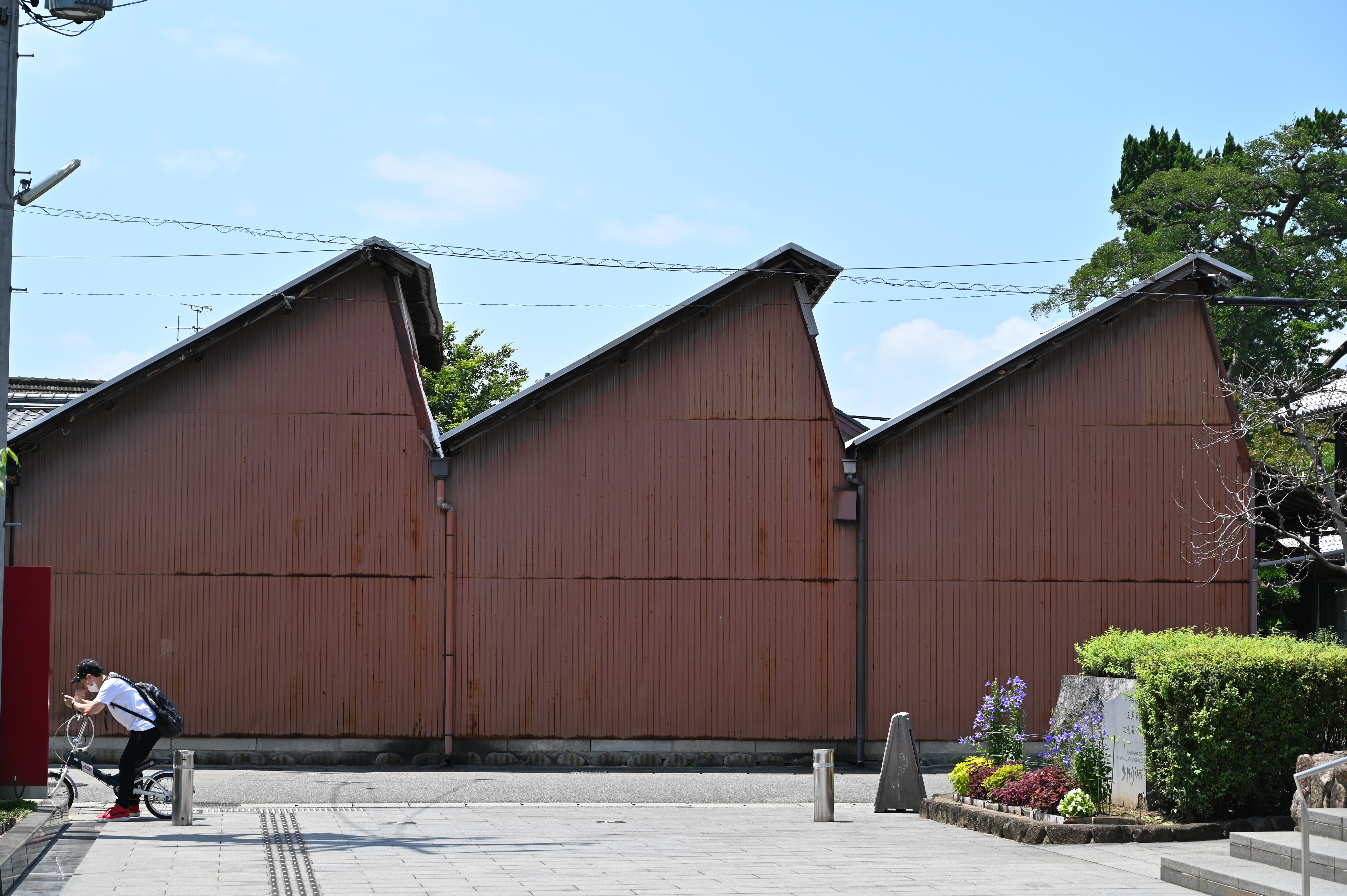 一宮市の織物工場